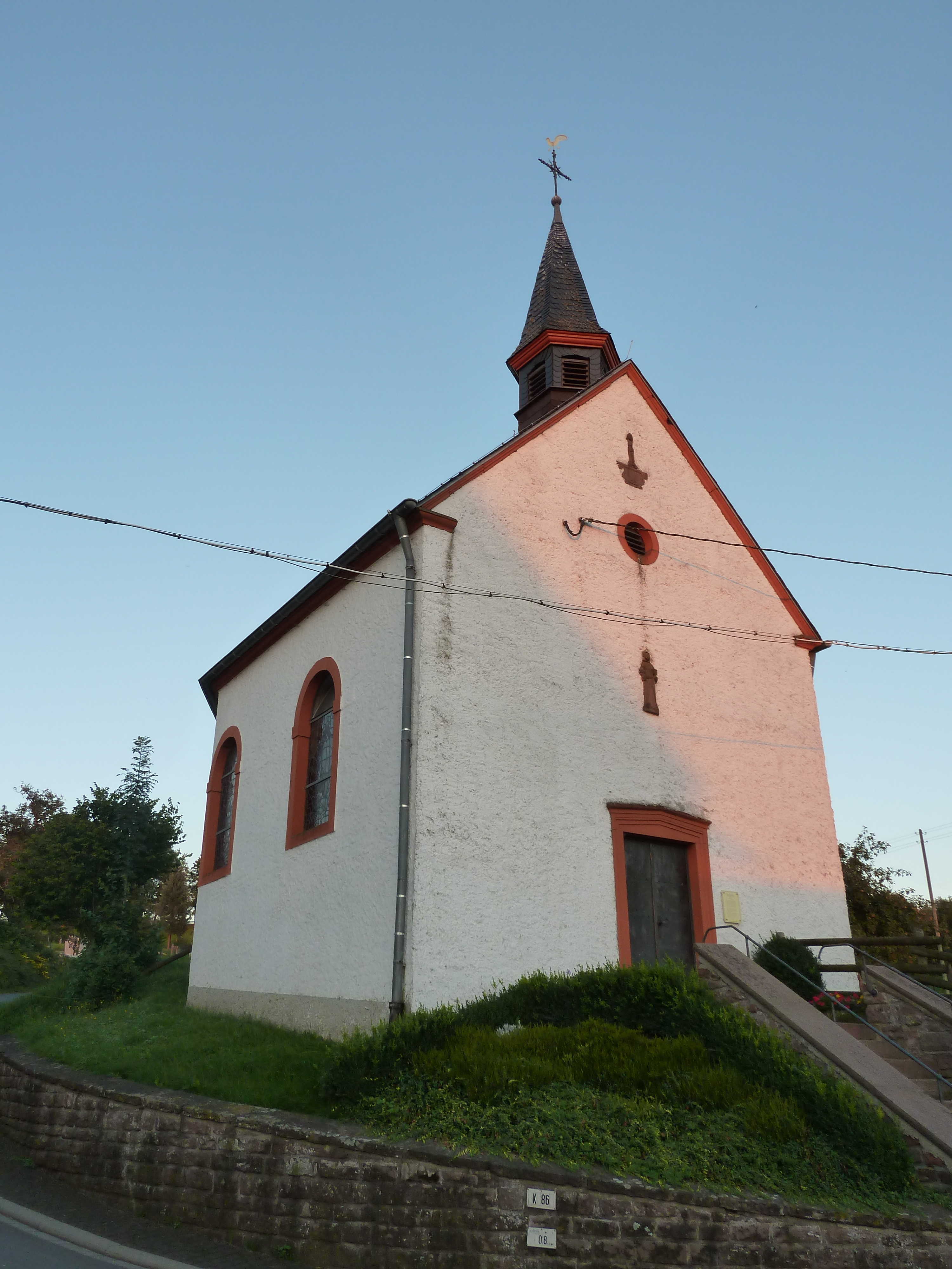 Sint Maria kerk in Etteldorf